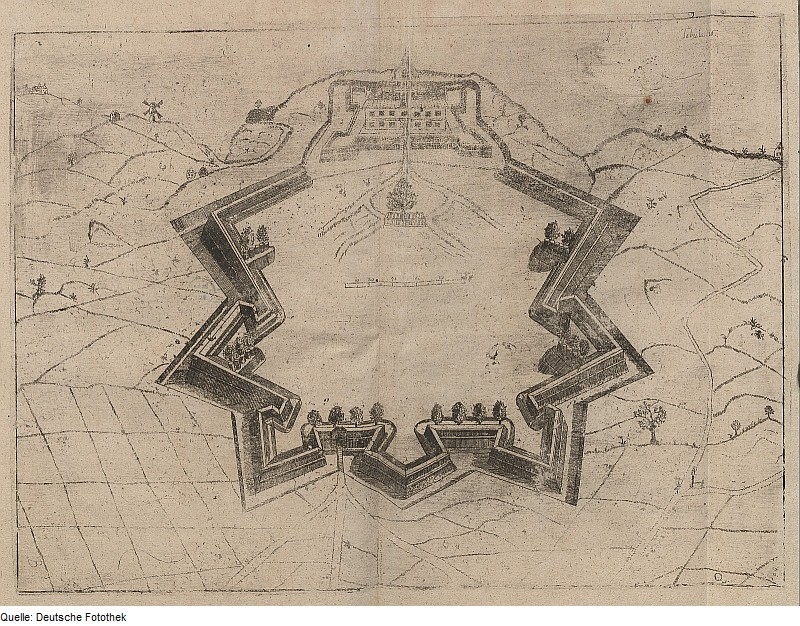 Original image description from the Deutsche Fotothek Architektur & Festungsbau